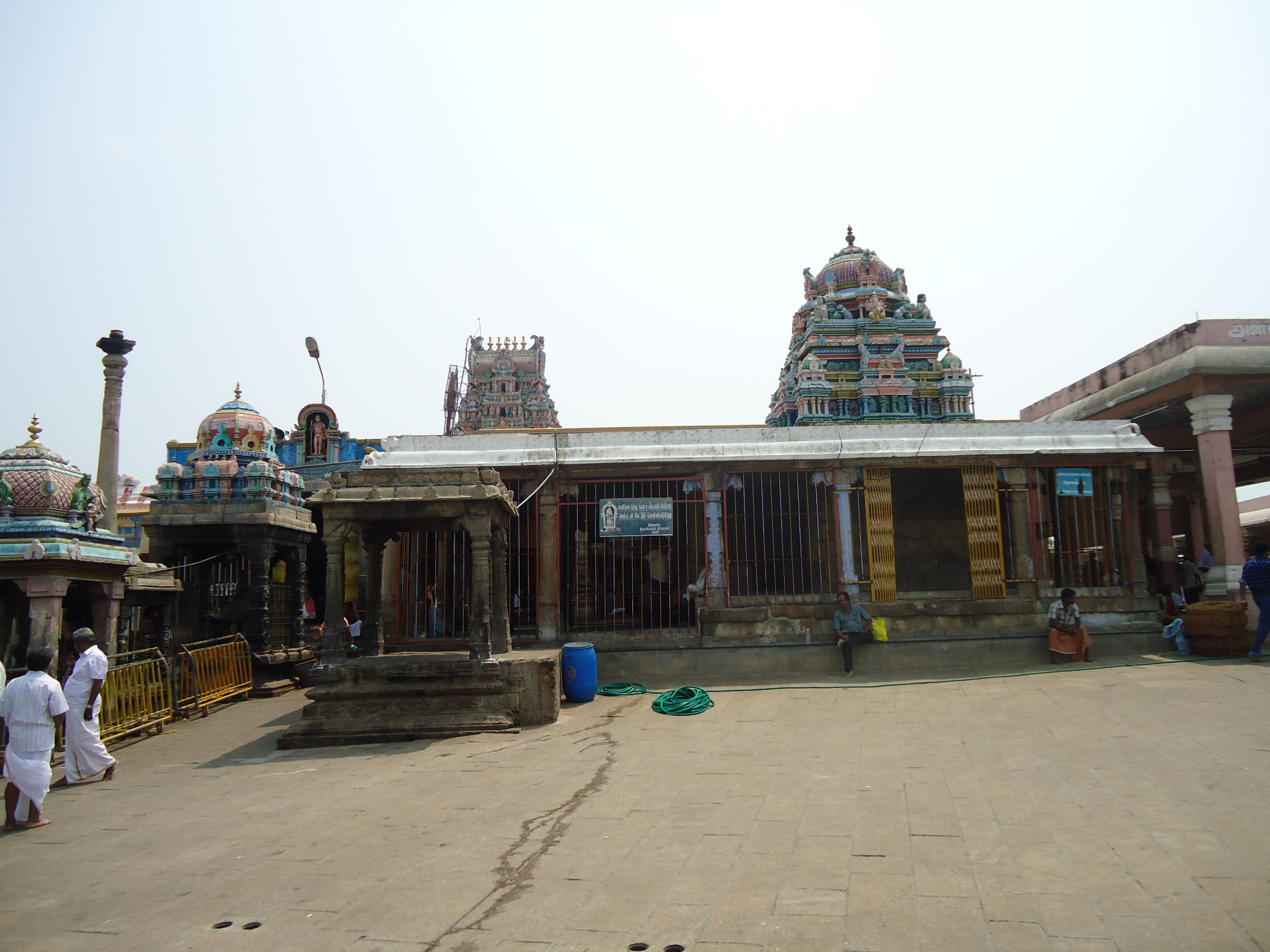 Palani Hill Temple1